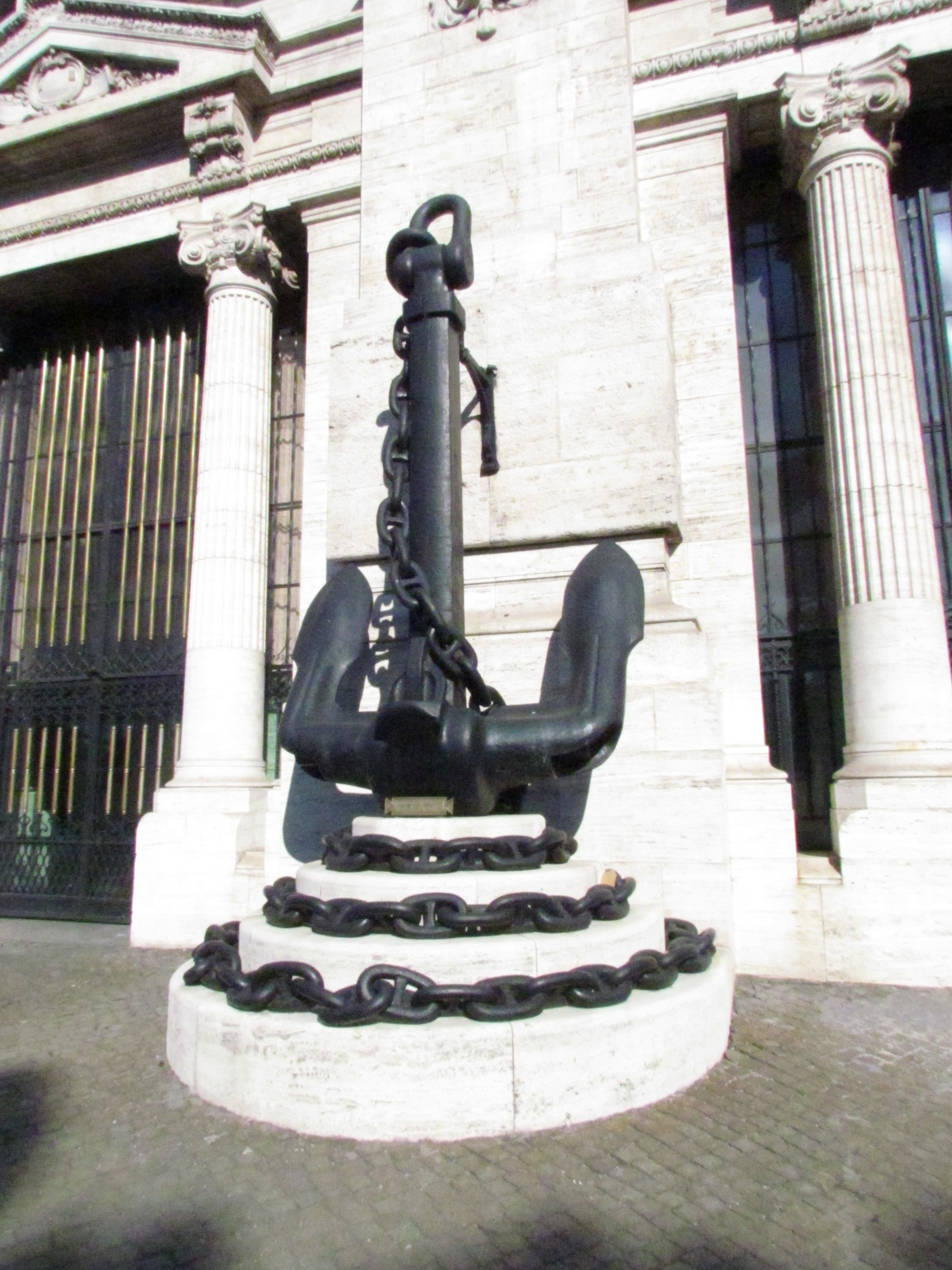 Bildinhalt: Anker des Schlachtschiffs "Viribus Unitis" vor dem Palazzo della Marina in Rom Aufnahmeort: Rom, Italien